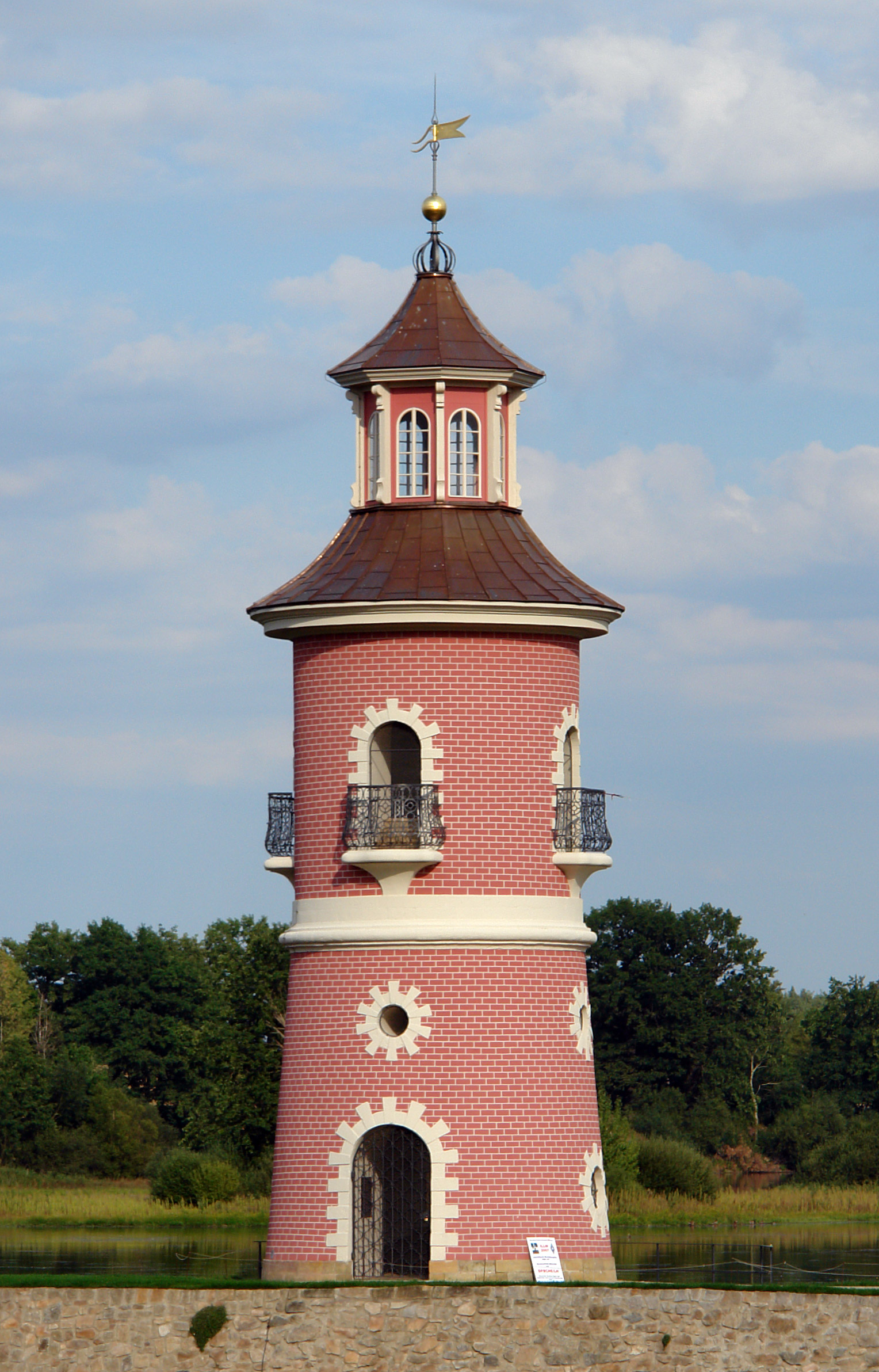 Leuchtturm Moritzburg